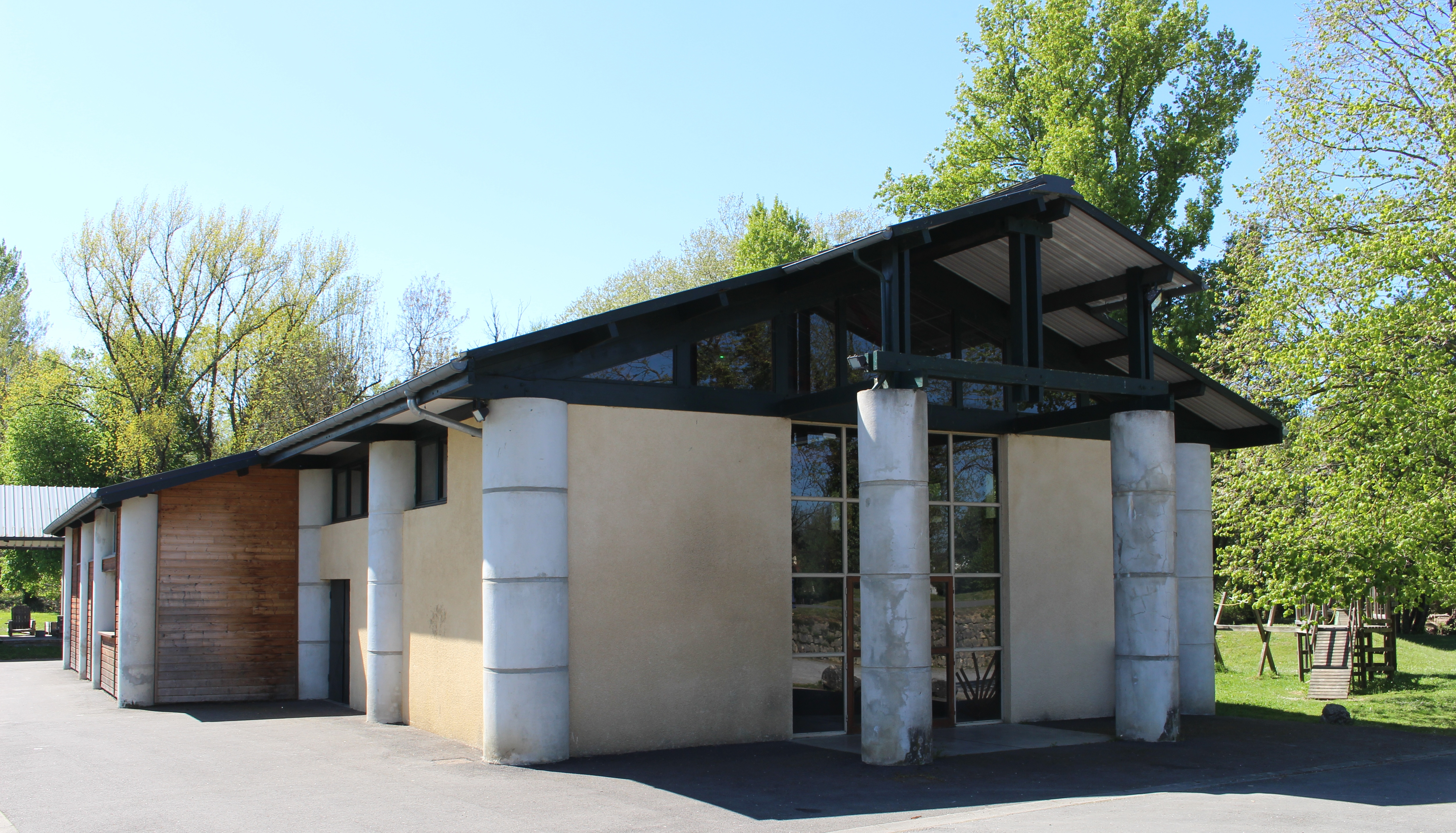 Salle des fêtes de Hiis (Hautes-Pyrénées)